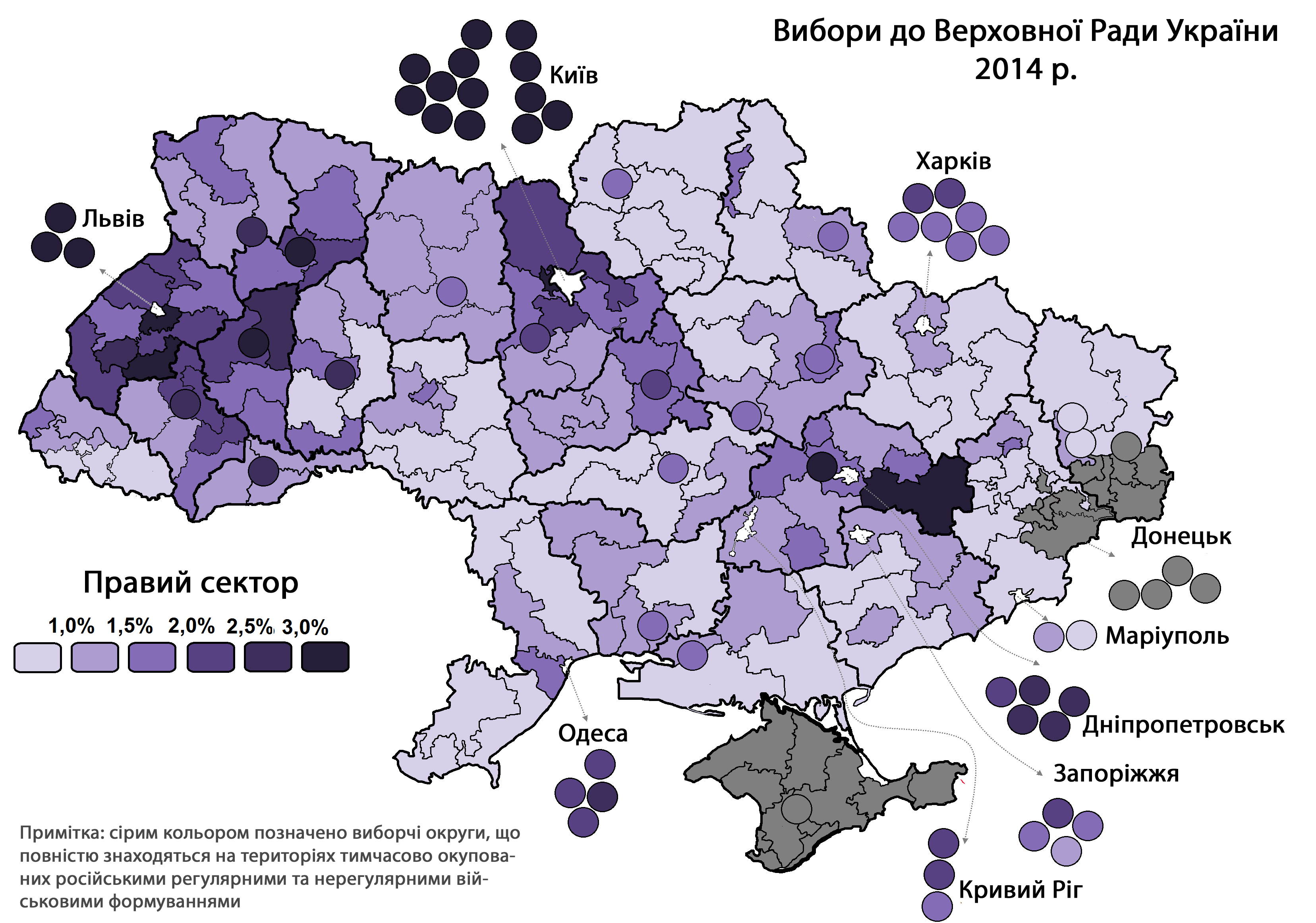 Вибори до Верховної Ради України. Кількість набраних голосів партією Правий сектор у відсотках за округами.